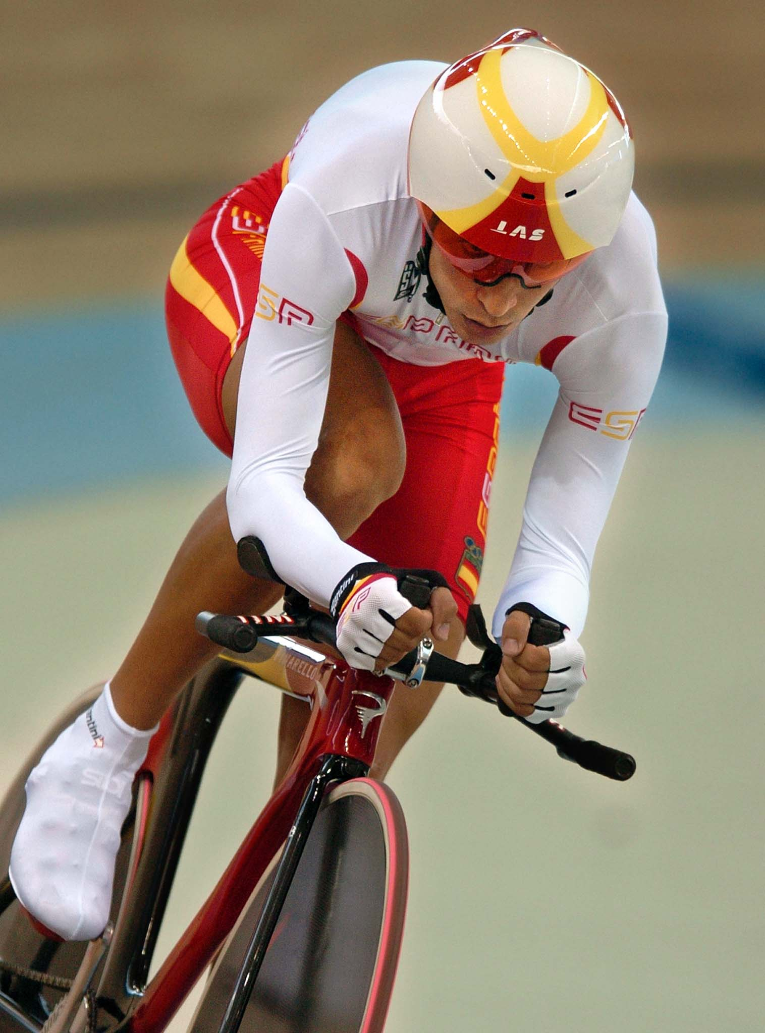 Carlos Castaño en plena competición en la Olimpiada de Atenas 2004